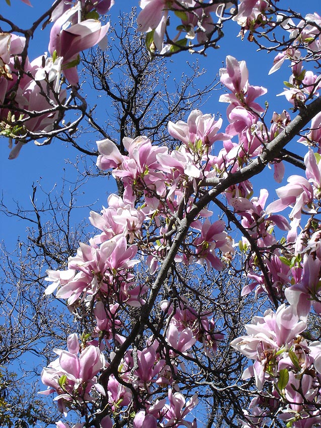 Magnolia × soulangeana, photo prise à Vernet-les-Bains (France) en avril 2005.